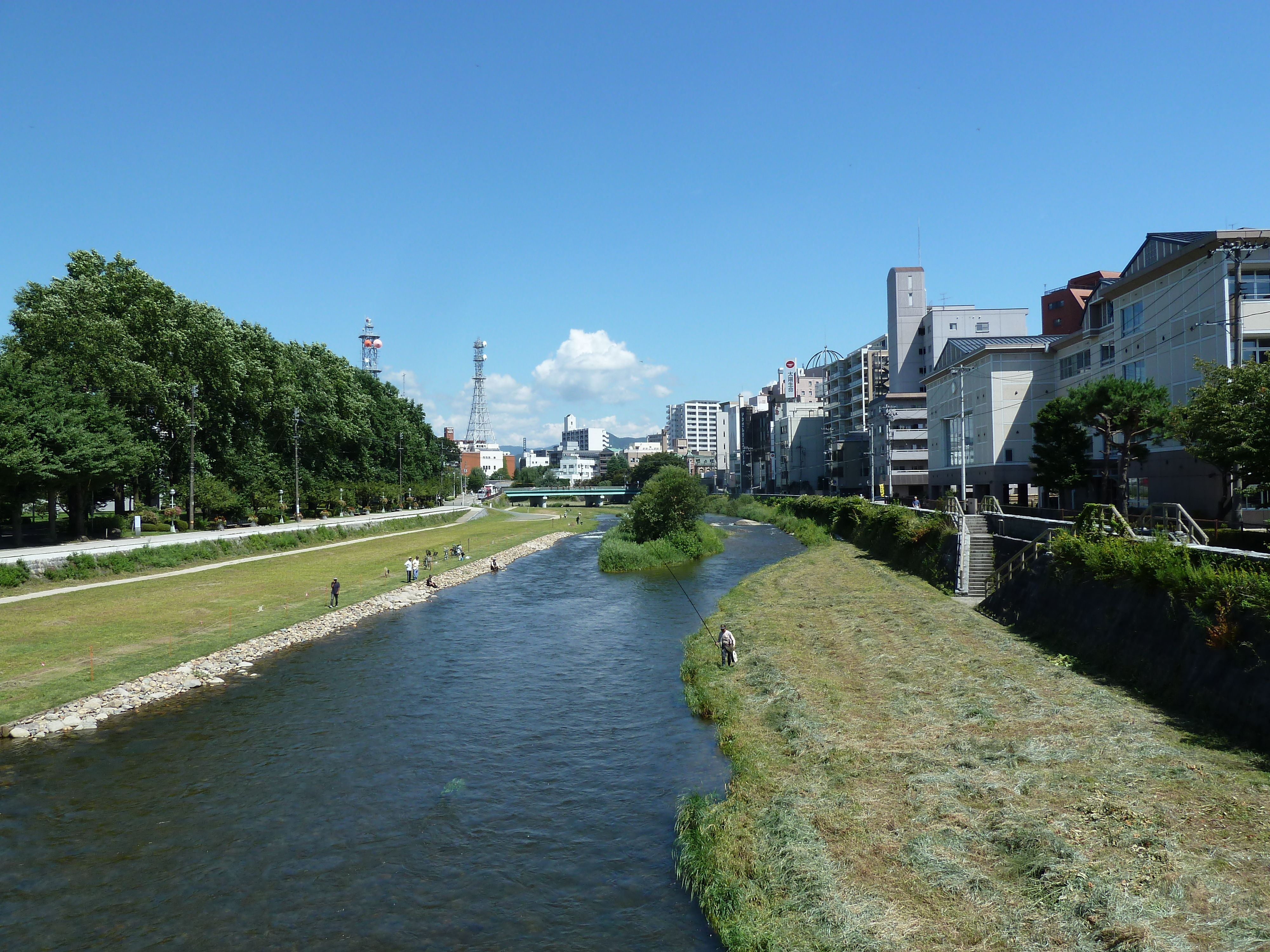 盛岡市内を流れる中津川